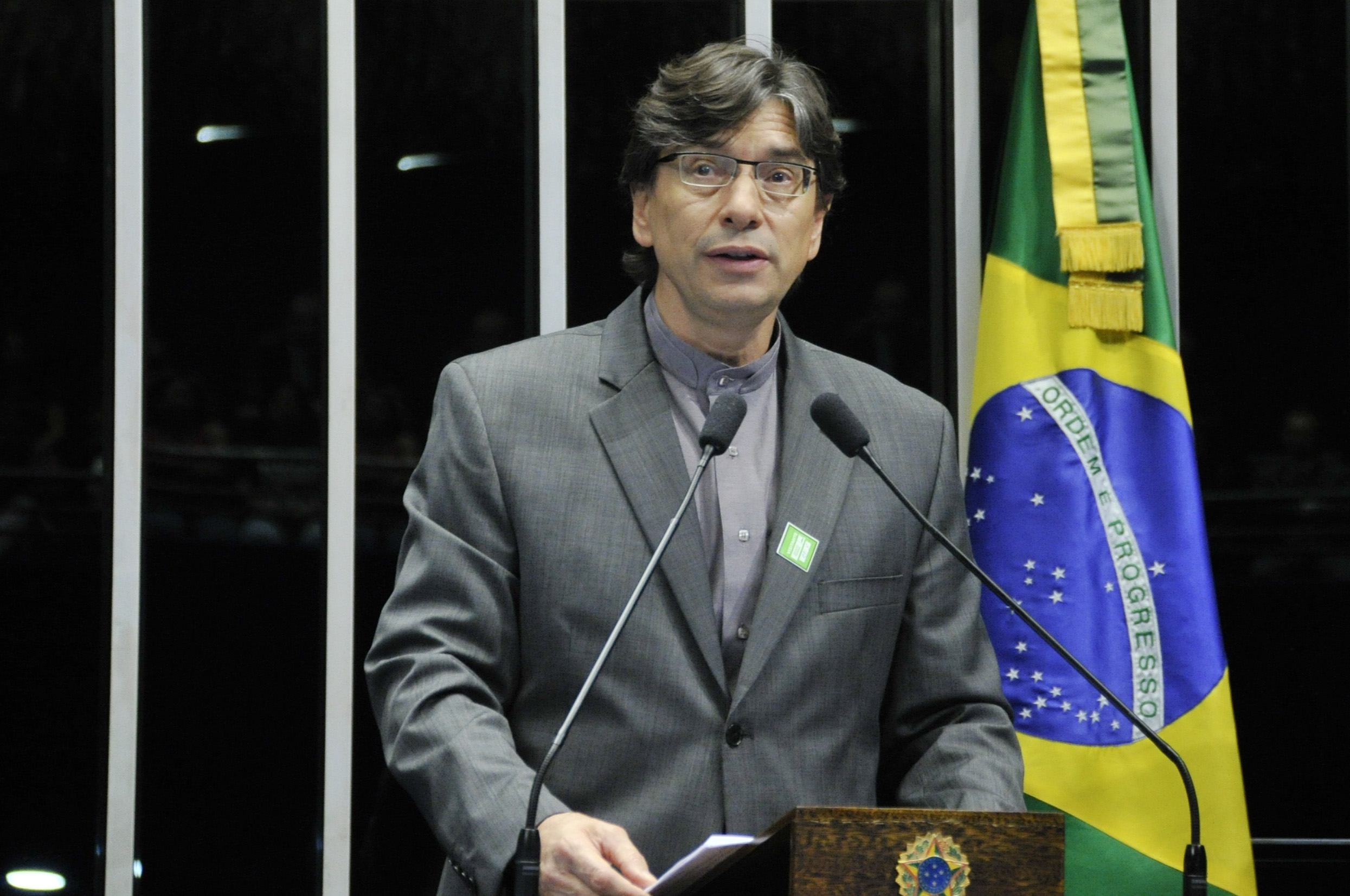 Sessão temática do Plenário do Senado Federal que discute a regulamentação da terceirização no país, o PLC 30/2015. Em discurso, o economista Márcio Pochmann. Foto: Geraldo Magela/Agência Senado